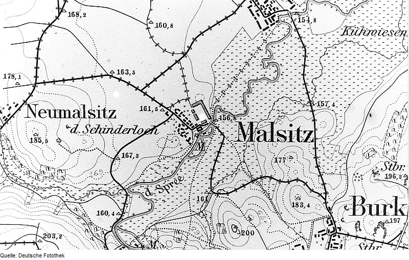 Original image description from the Deutsche Fotothek Bautzen-Malsitz. Meßtischblatt, Sekt. Luttowitz, 1884